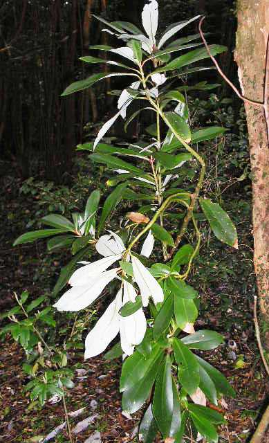 Árbol joven de canelo (Drimys winteri) en Colecole, costa occidental de la Isla Grande de Chiloé, Chile